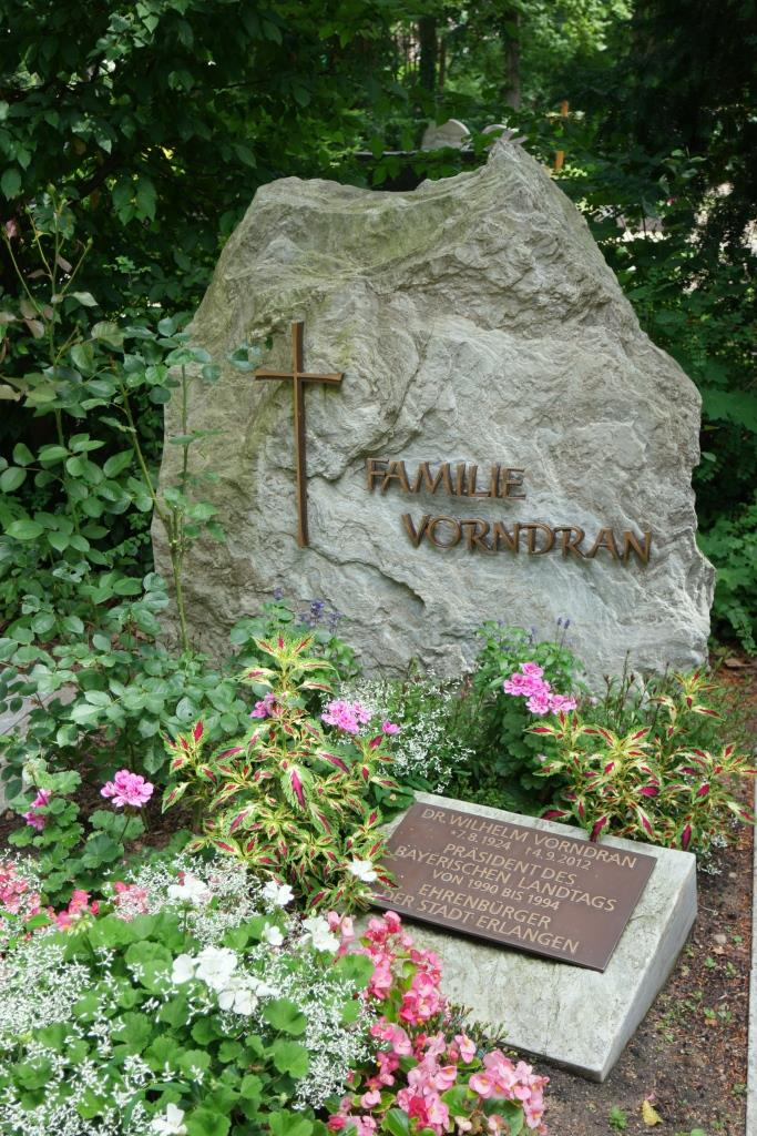 Grab des CSU-Politikers Wilhelm Vorndran, 1924-2012, auf dem Zentralfriedhof in Erlangen